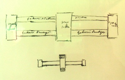 Gustav III skiss av Stora Haga slott. Gustav III. eigenhändige Skizze